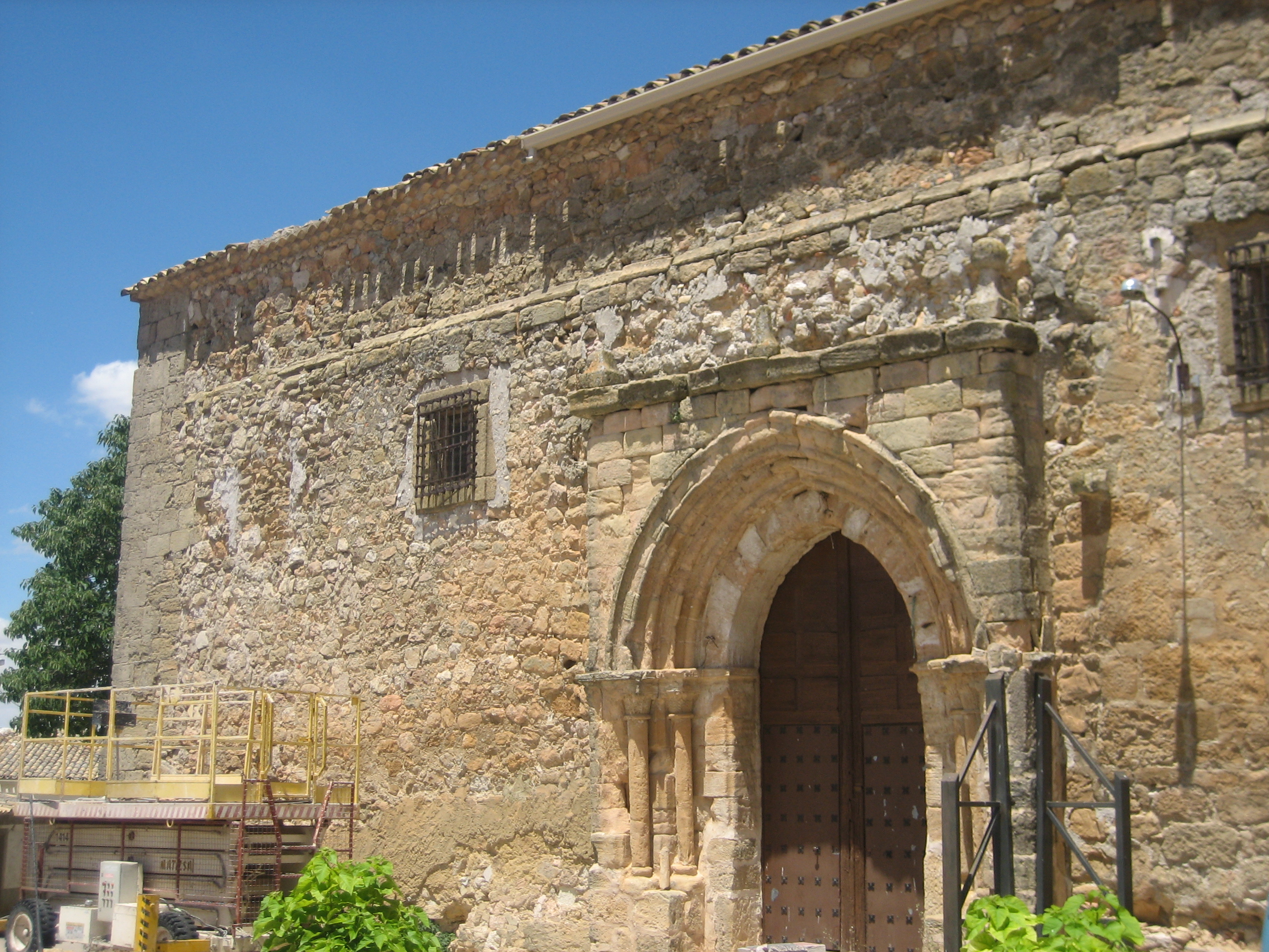 Lateral de la Iglesia de San Pedro Apóstol de Cervera del Llano